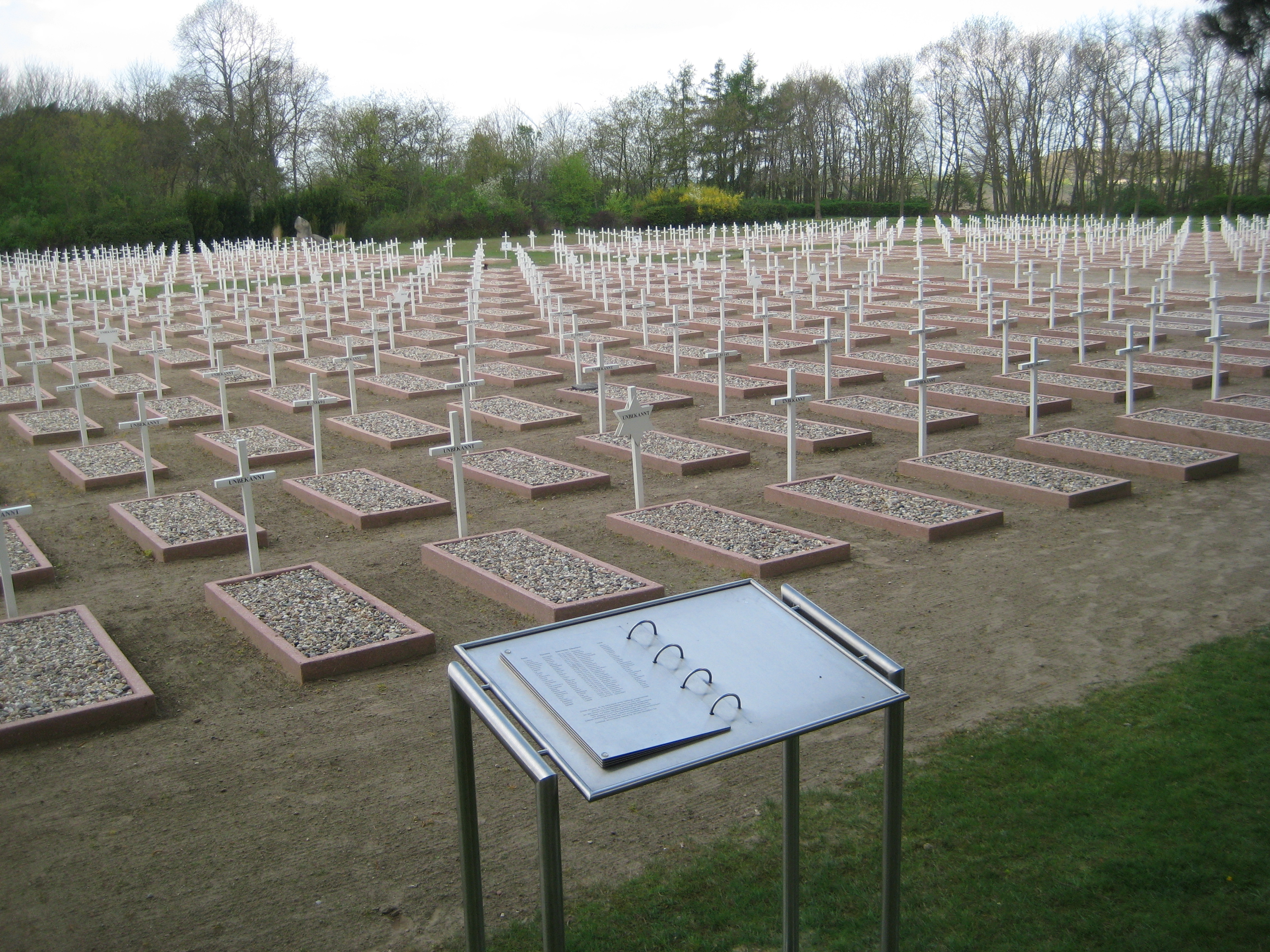 Verzeichnis der Opfer vor dem Friedhof